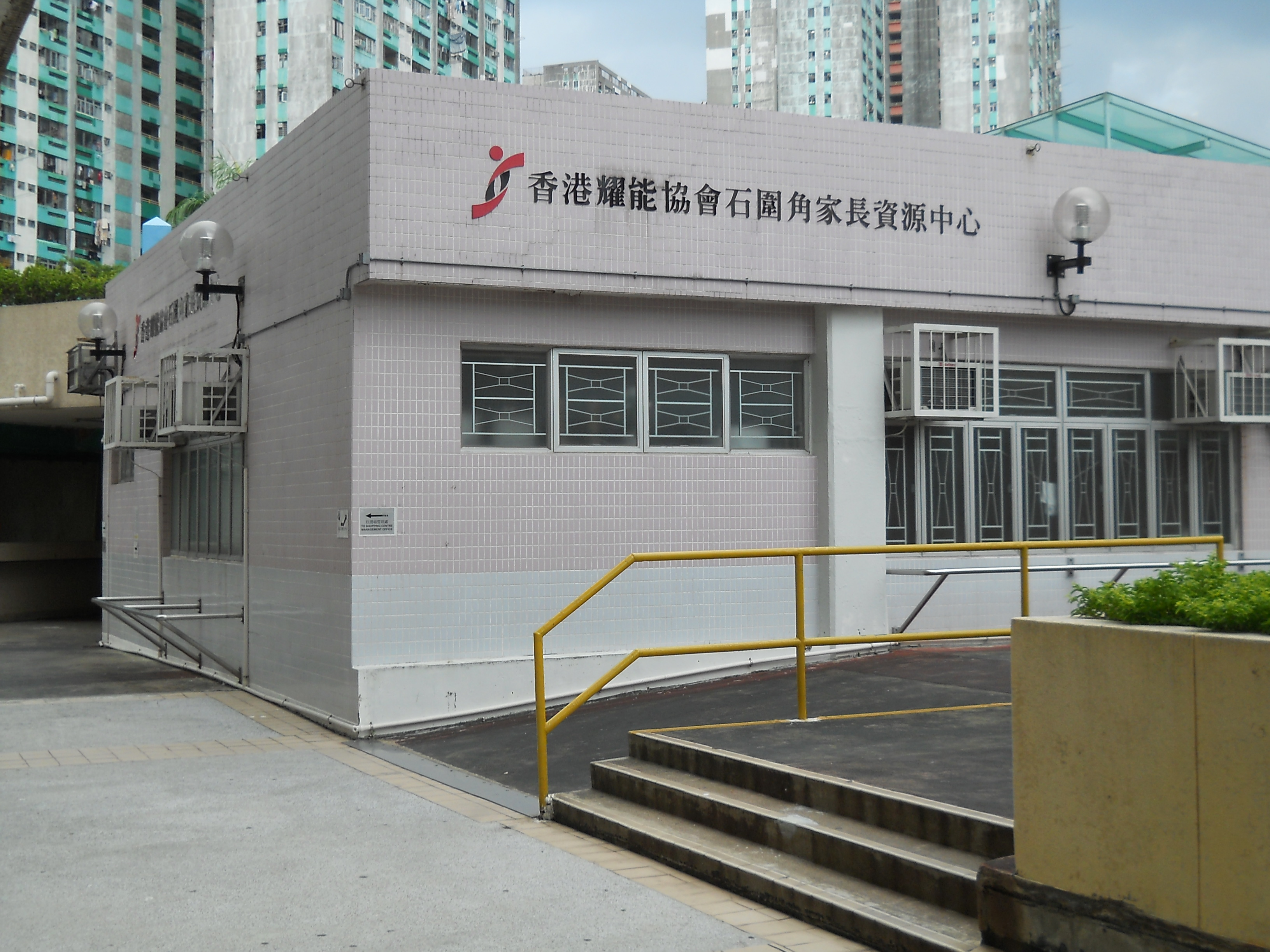 中文（香港）: 香港耀能協會石圍角家長資源中心